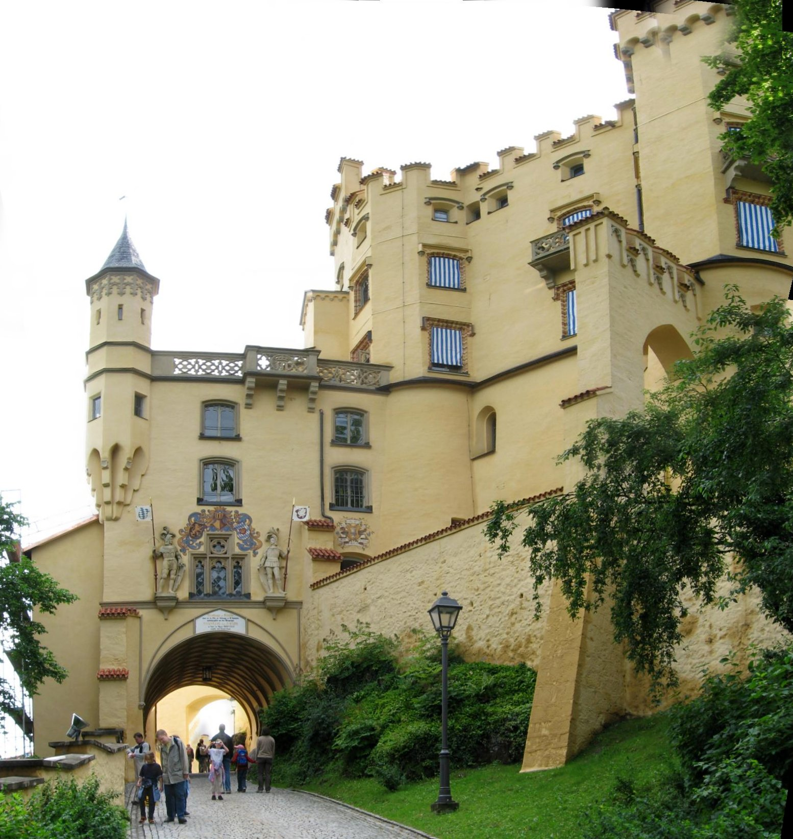 Hohenschwangau